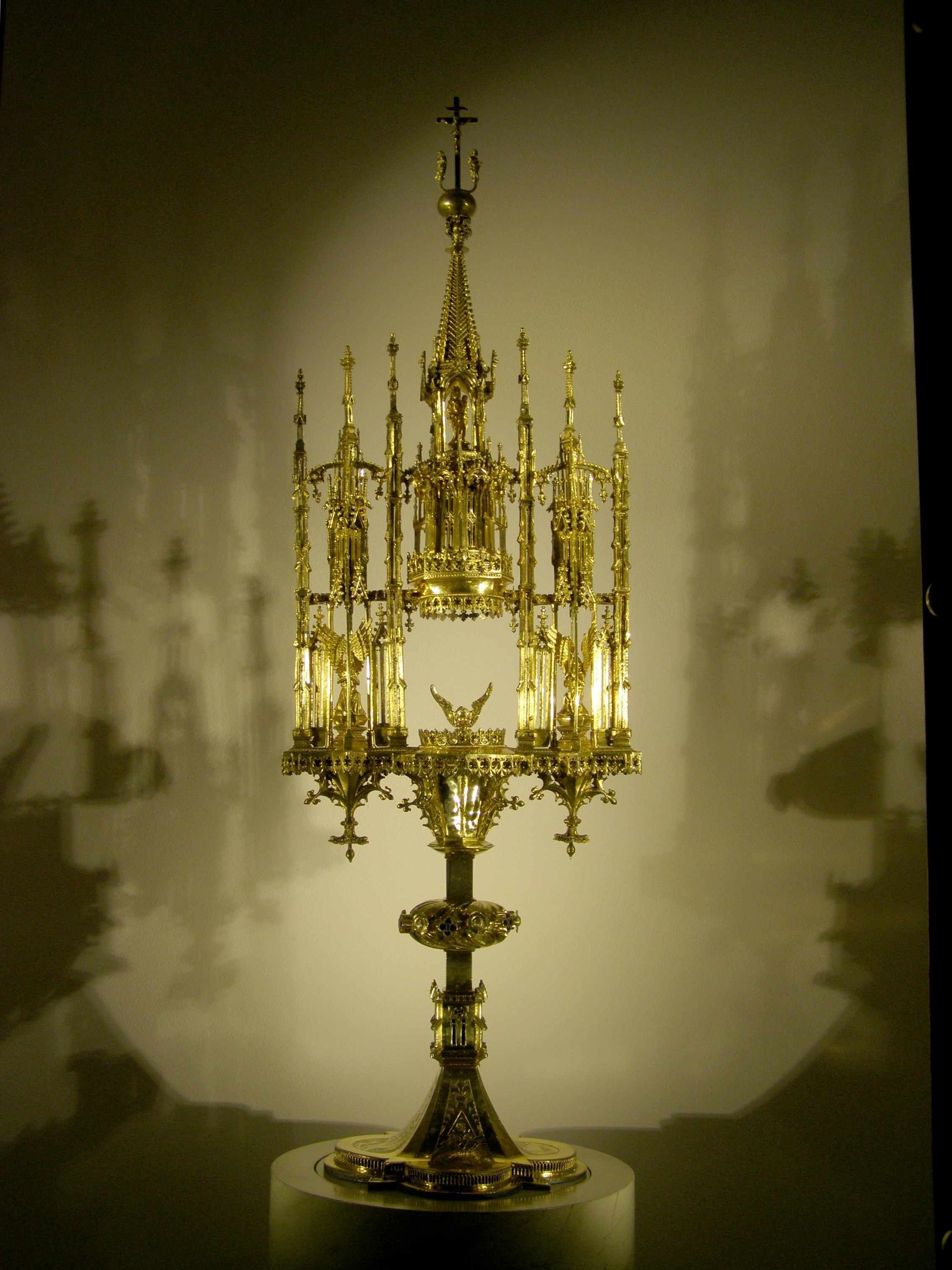 Česky: Kutná Hora, část Sedlec, klášterní kostel Nanebevzetí Panny Marie a svatého Jana Křtitele, sedlecká monstrance